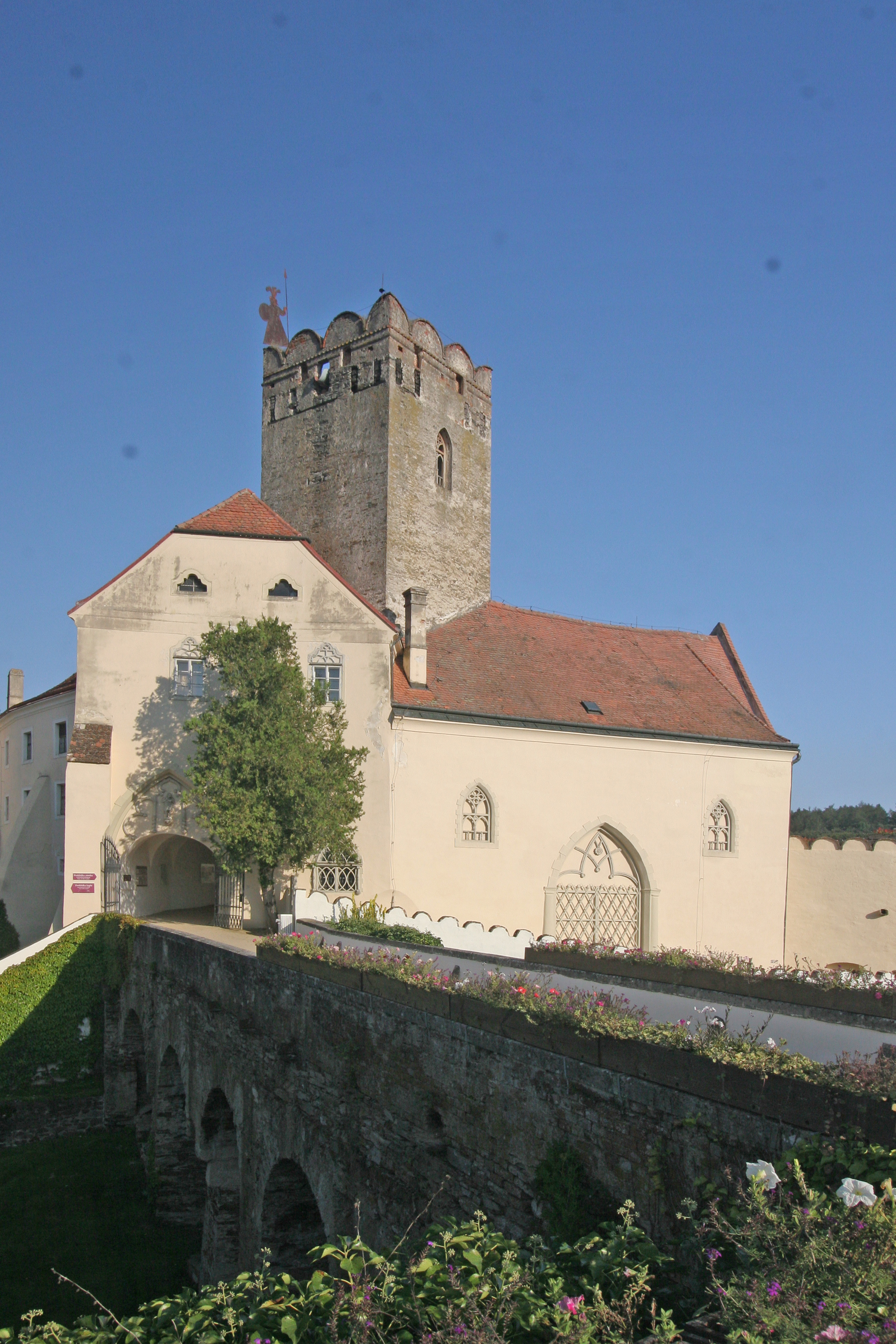 Zámek Vranov nad Dyjí Hrad a zámek Vranov nad Dyjí, Vranov nad Dyjí.